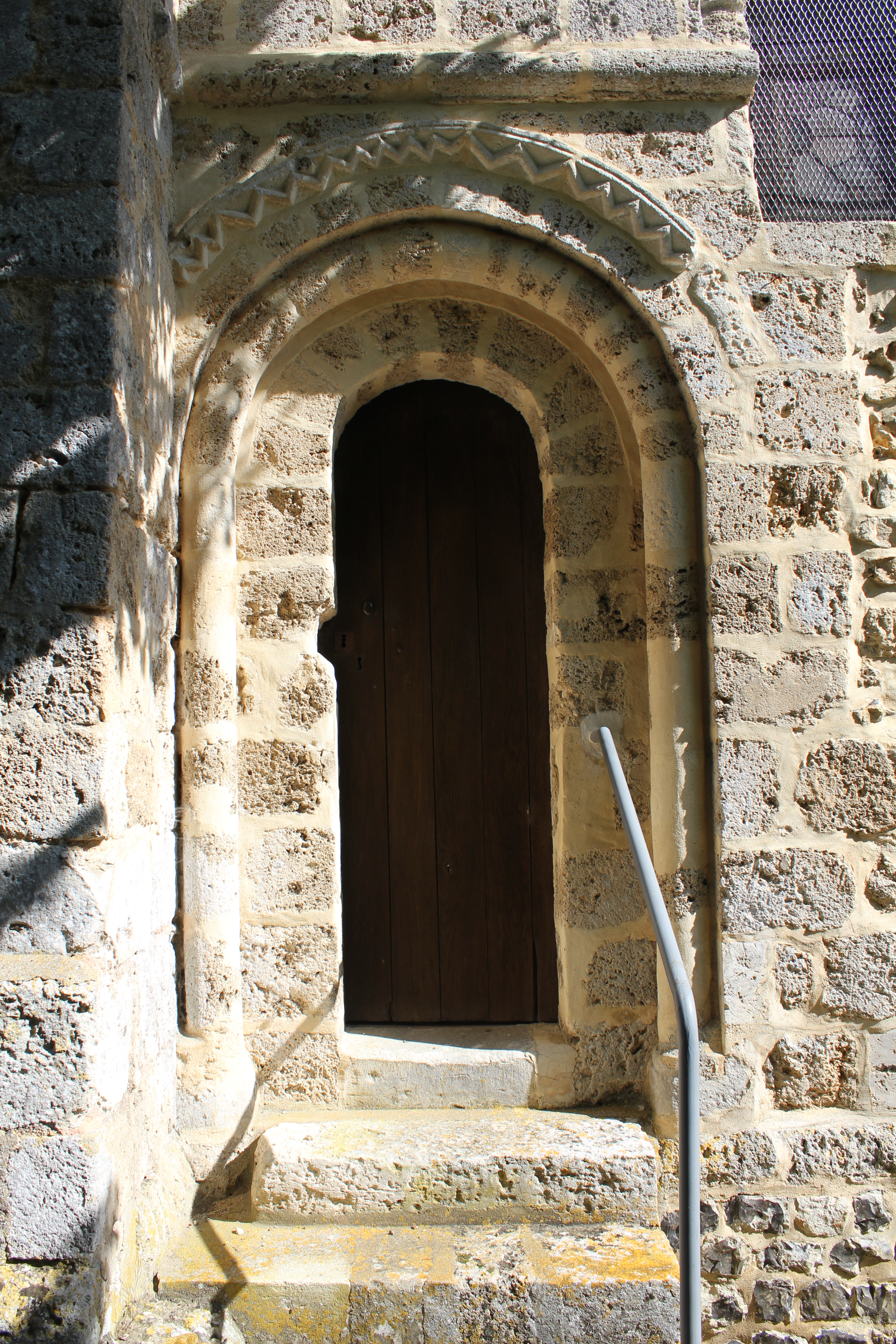 Porte romane de l'église paroissiale Notre-Dame aux Préaux